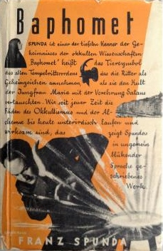 Vordere Umschlagseite zu Franz Spundas Roman "Baphomet", 1928